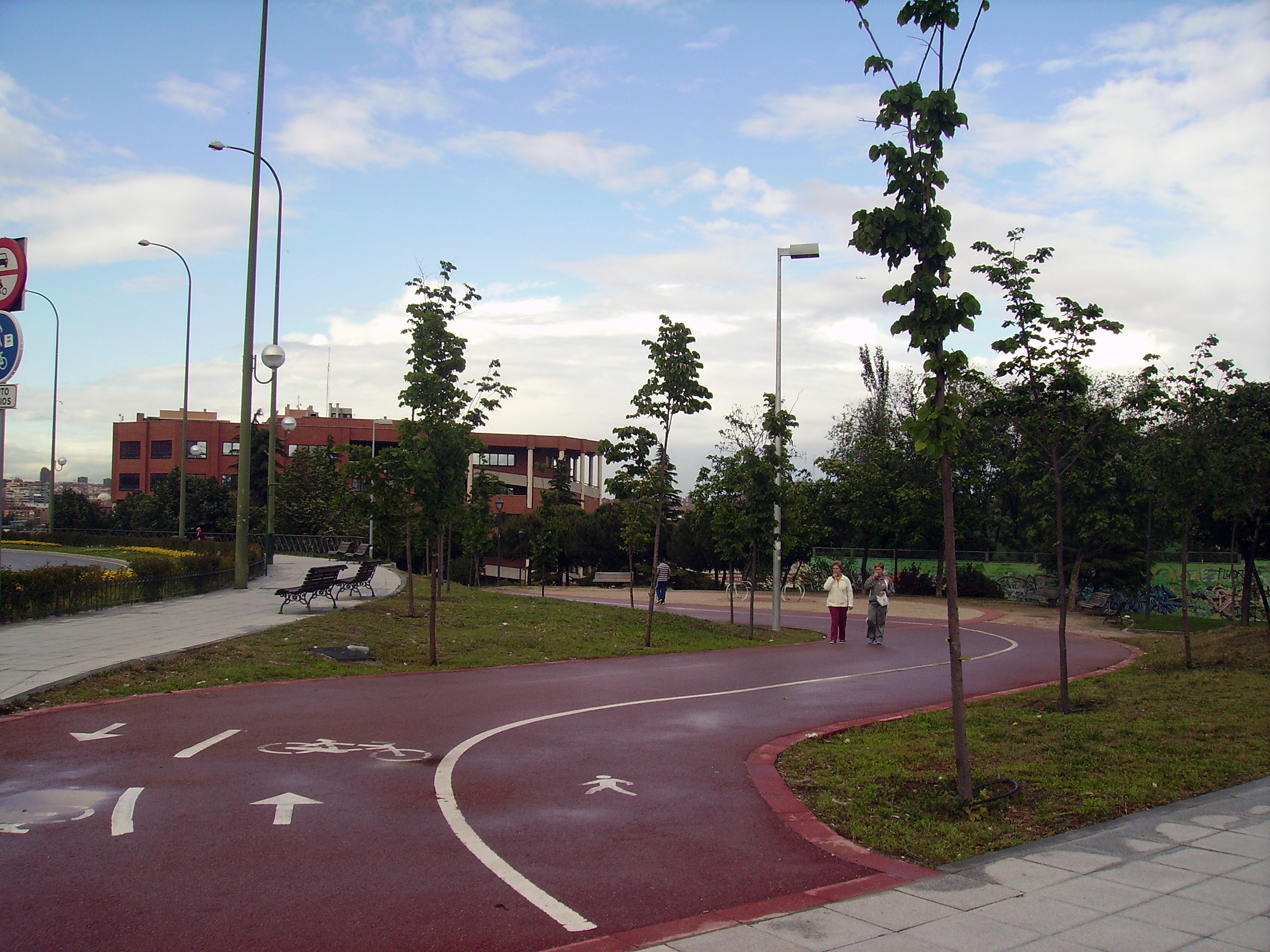 Anillo Verde Ciclista al comienzo de la Avda de la Paz